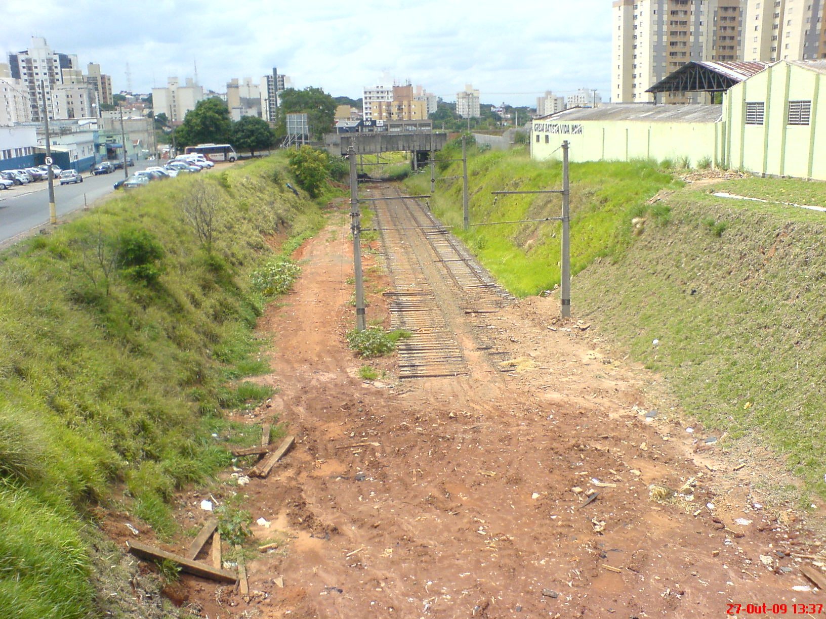 BYE BYE VLT...todos esses trilhos indo embora para MAceio-AL. UMA PENA para CAmpinas,BOM PARA OS ALAGOANOS, PARA NOS CAMPINEIROS, SO RESTA TRISTEZA!